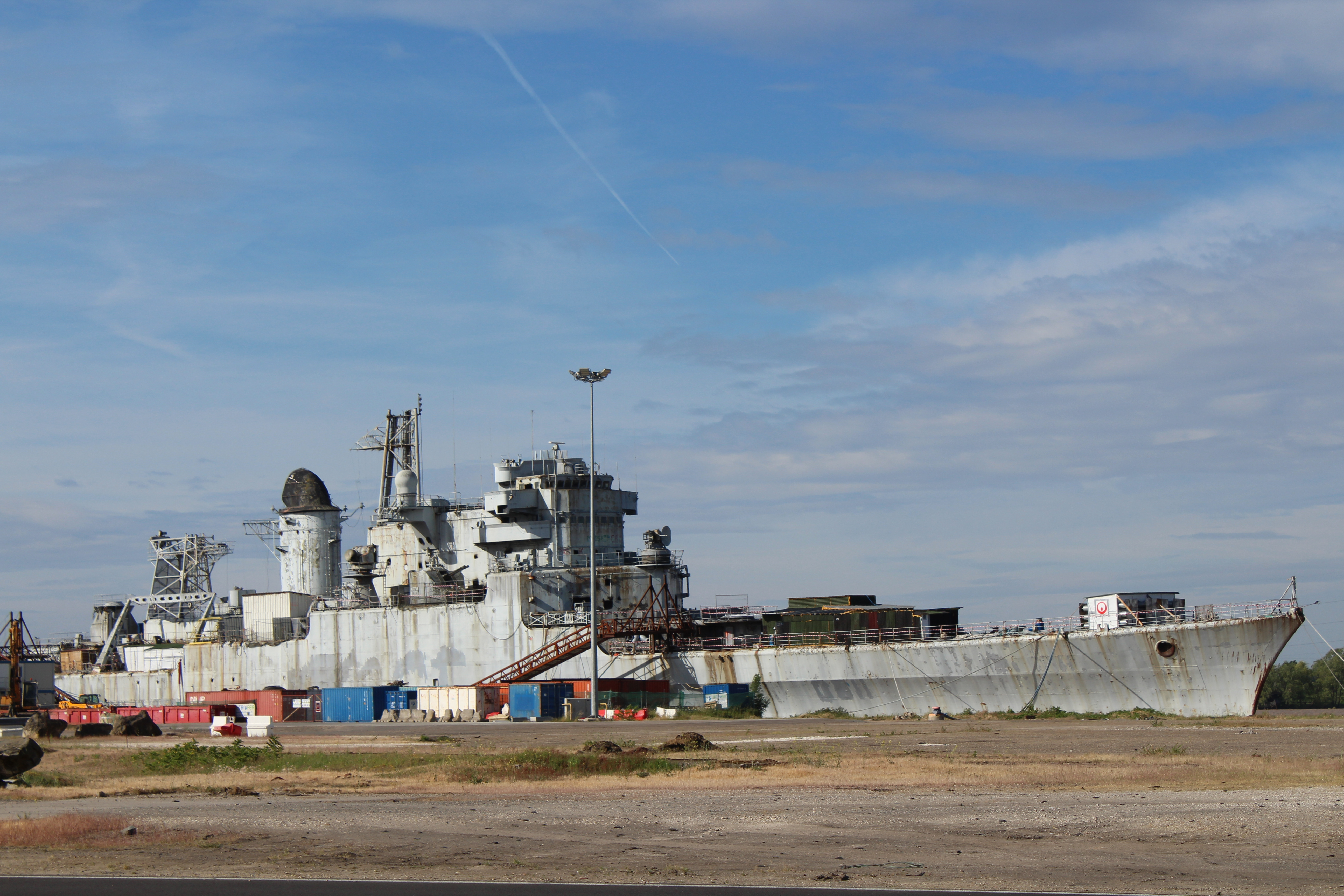 Le Colbert (croiseur, C 611) en déconstruction au port de Bassens (Gironde, France). Ancien bâtiment de la Marine nationale française, désarmé en 1991. Arrivé du cimetière de bateaux de Landévennec (Bretagne) le 5 juin 2016.